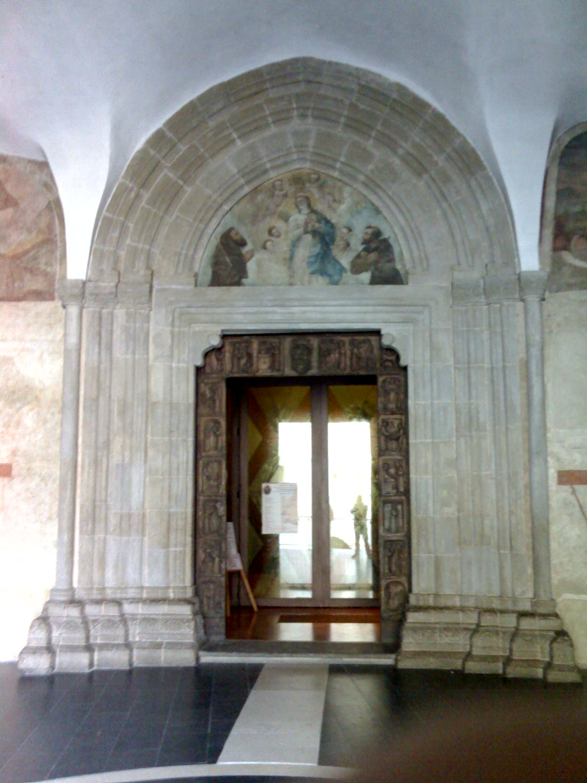 Portale della basilica antica del Santuario di San Francesco a Paola (CS)